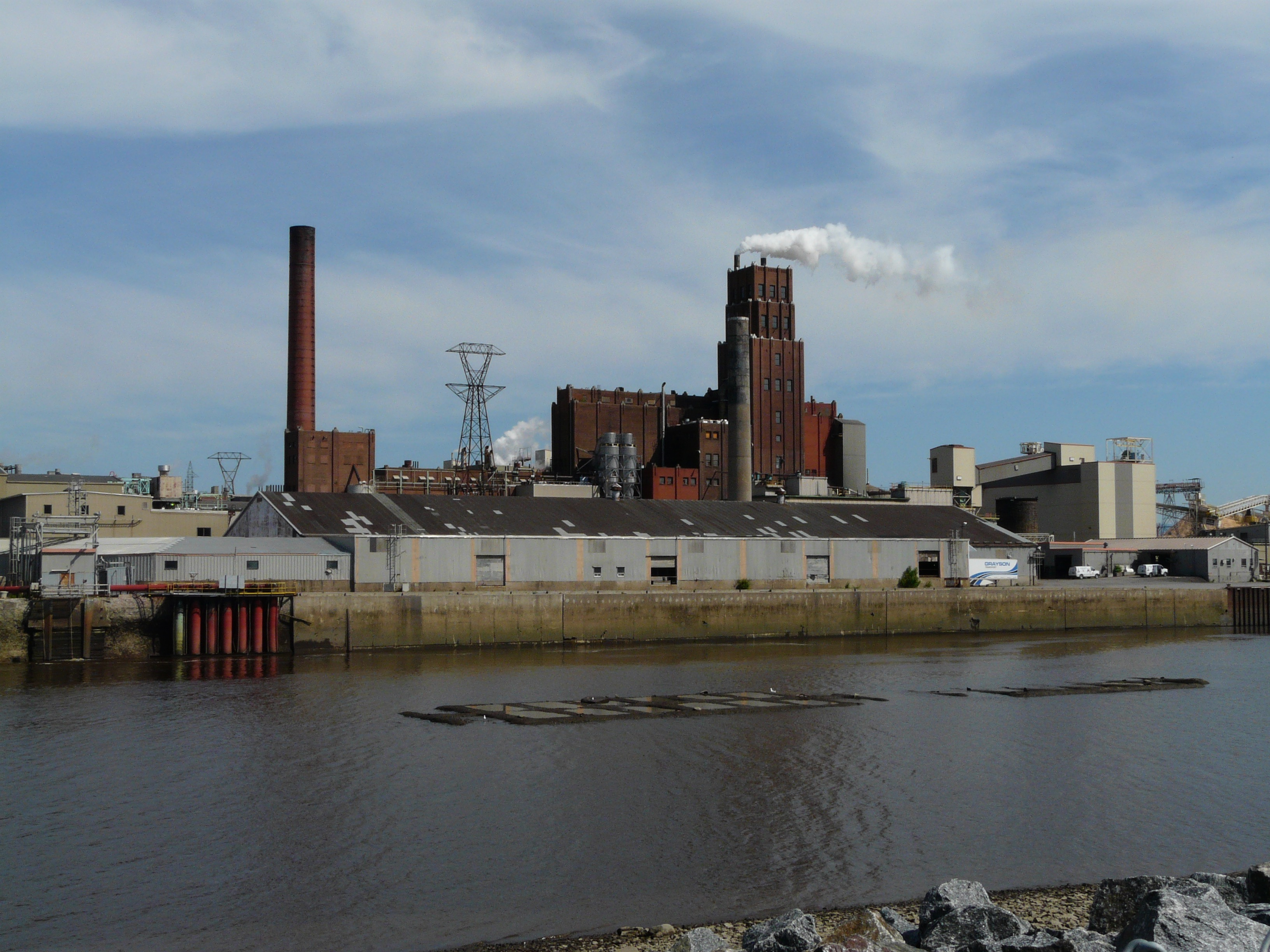 Usine Papiers White Birch vue depuis la rive sud de la rivière Saint-Charles.